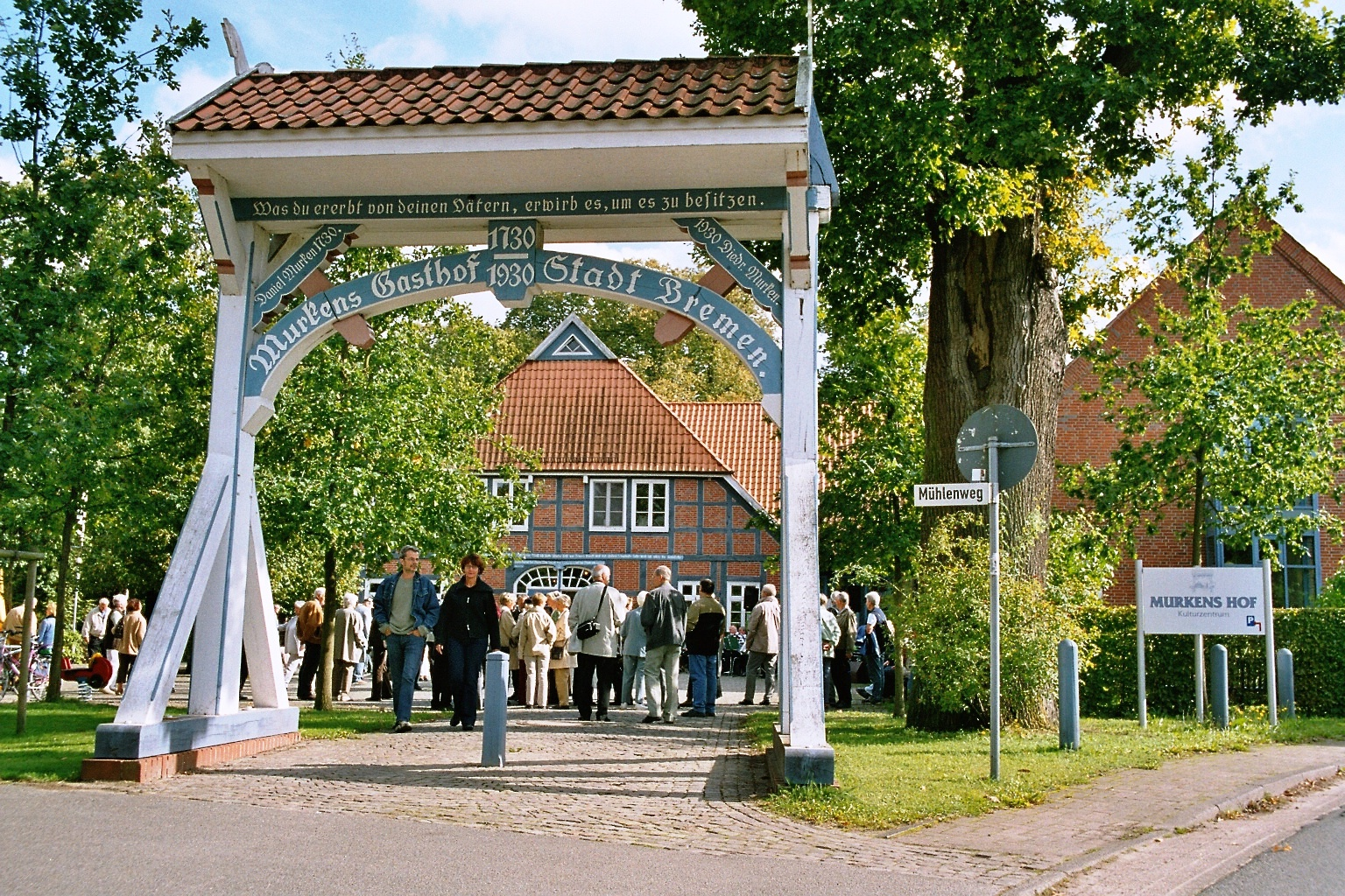 Eingang zu Murkens Hof in Lilienthal